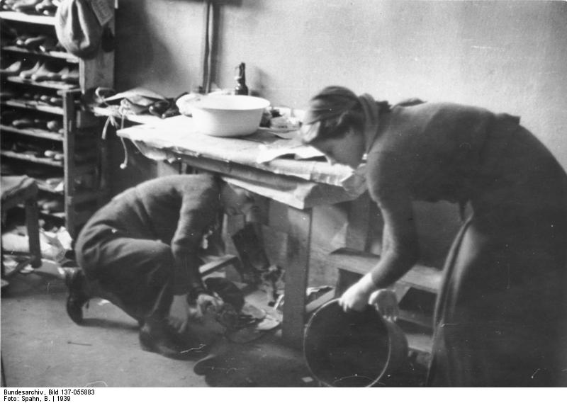 Polen, Wohnung für Baltendeutsche Adlershorst / Balten-Umsiedlung Baltenumsiedlung: Arbeitsmaiden des Reichsarbeitsdienstes beim Säubern polnischer Häuser [Polen.- Vorbereitung ehemals polnischer Wohnungen für baltendeutsche Umsiedler.]